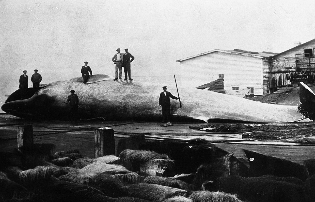 Une fabrique d’huile de baleine dans la Baie de Sept-Îles, vers 1910. « Cette photographie représente des chasseurs de baleine travaillant fort probablement pour la Steam Whaling, une fabrique d’huile de baleine fondée par une société norvégienne, en 1905, à Pointe-Noire, presqu’île de la baie de Sept-Îles. Entre 1905 et 1913, dernière année d’activités de la fabrique, les chasseurs harponnaient environ 75 baleines chaque année entre juillet et octobre. Le gras du cétacé, une fois fondu, entrait dans la fabrication de certains aliments et servait de combustible pour les lampes à l’huile. Les soixante employés et la vingtaine de pêcheurs norvégiens saisonniers de la Steam Whaling extrayaient plus de 900 000 litres d’huile par année. »